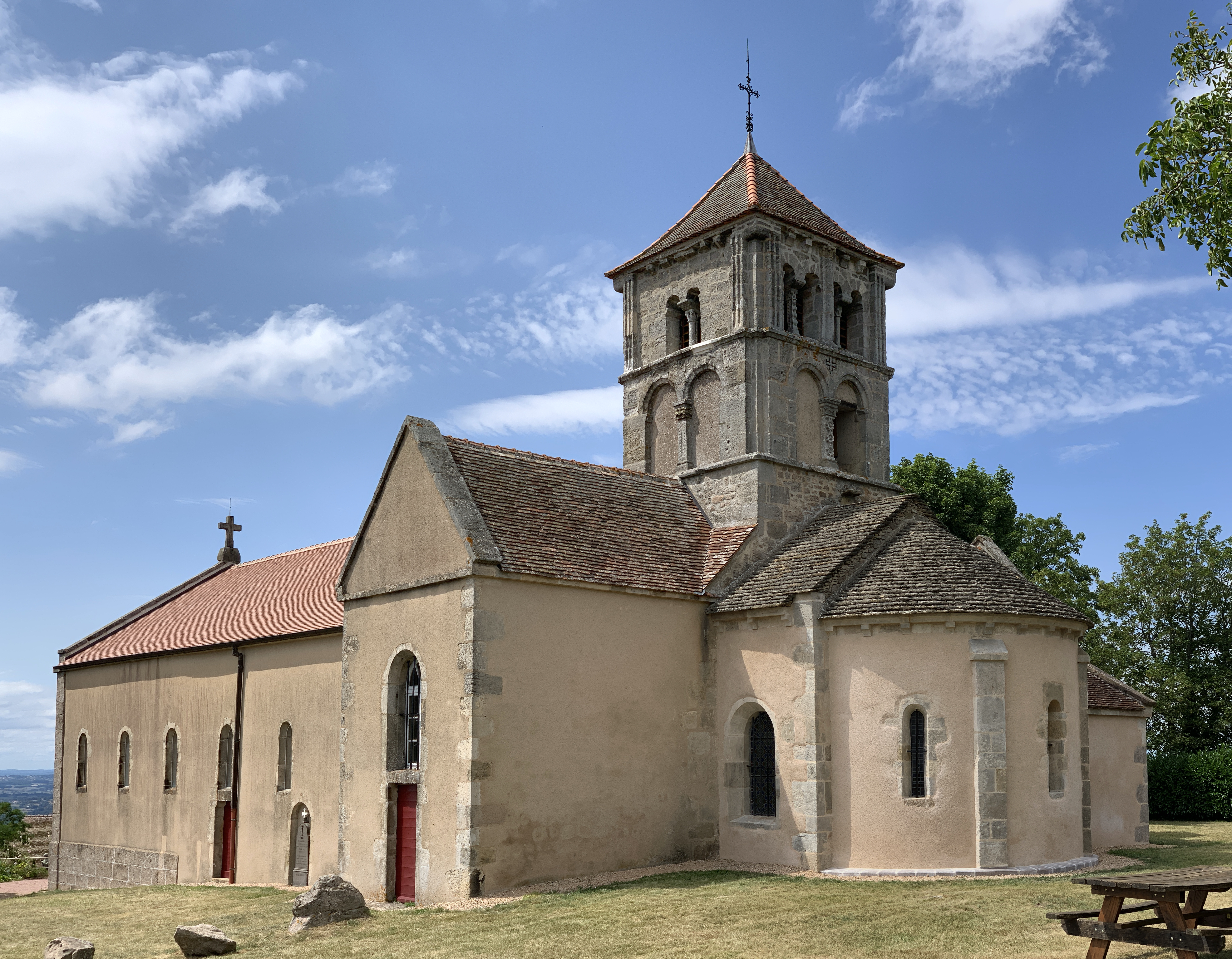 Église Notre-Dame-de-l'Assomption de Suin.